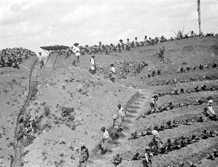 Negatief. Tabakscultuur jonge aanplant, Deli